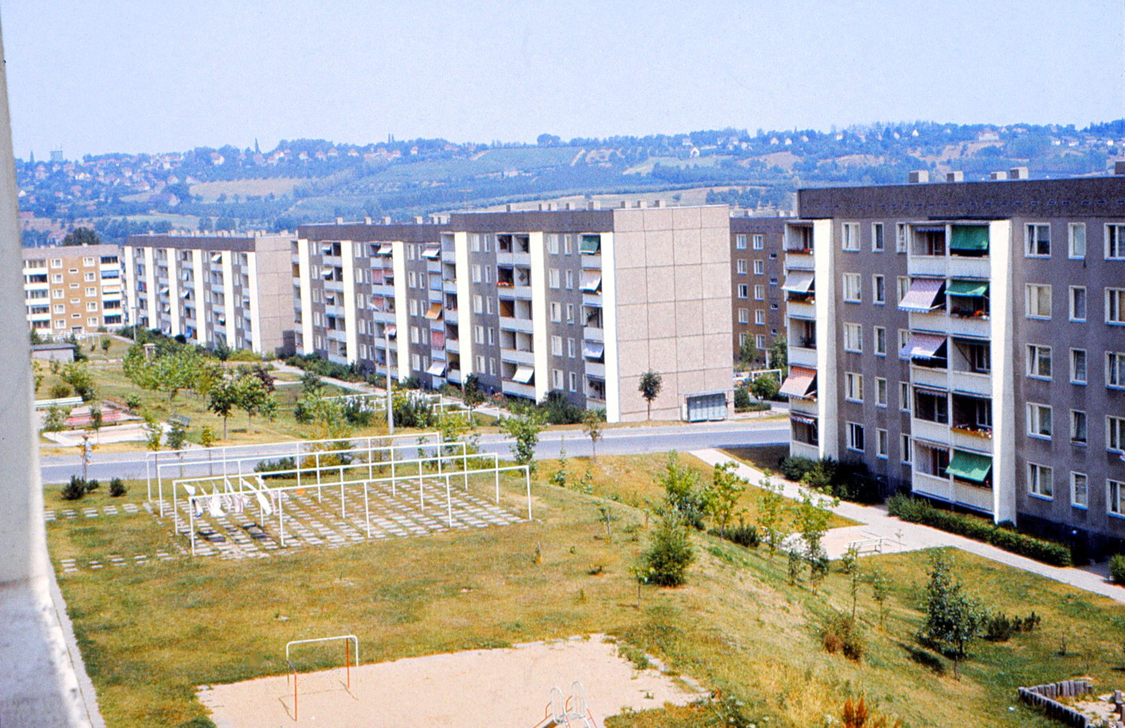 Blick über das Neubaugebiet Freital-Zauckerode.